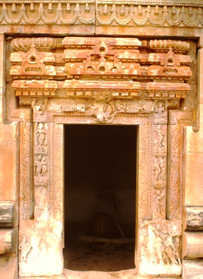 Amrol, Ramesvara-Mahadeva-Tempel, Portal